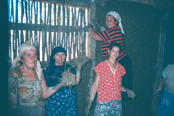 La lipit pereţii de nuiele. Foto: Vlad Calboreanu, 2001.